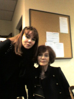 Yasmine GHATA et sa mère Vénus KHOURY-GHATA lors de leur conférence au jeudi de la Sorbonne, à Paris, en 2011